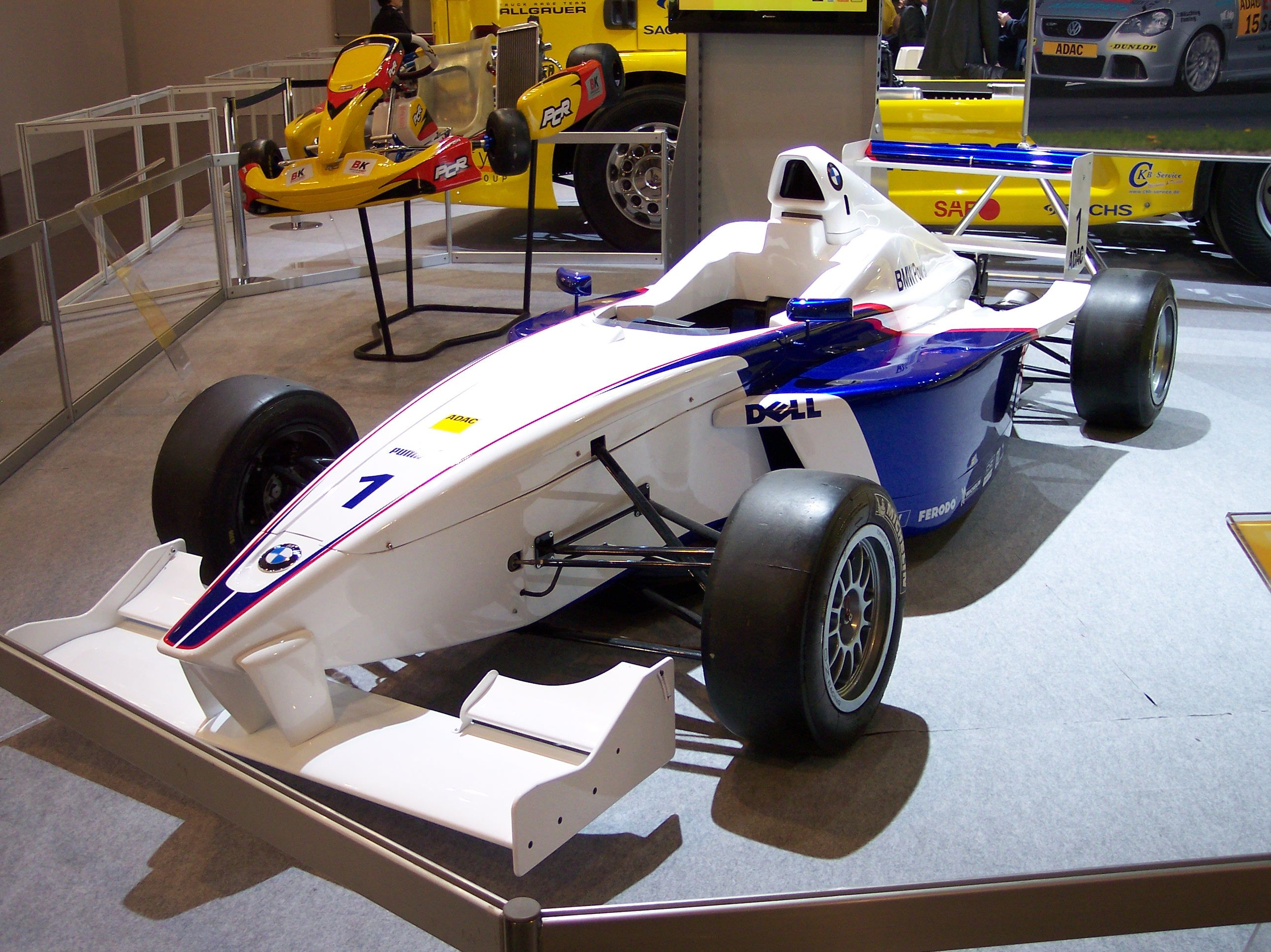 Description: Formel BMW ADAC 2006 Source: Eigenes Bild